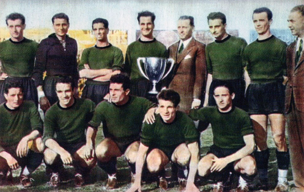 L'A.F.C. Venezia della stagione 1940-41 in posa dopo la vittoria della Coppa Italia. Da sinistra, in piedi: G. E. Piazza, G. Fioravanti, S. Di Gennaro, V. Tortora, A. Bennati (presidente), S. Puppo, L. Stefanini, G. B. Rebuffo (allenatore); accosciati: G. Alberti, E. Loik (II), A. Diotalevi, V. Mazzola, L. Alberico.